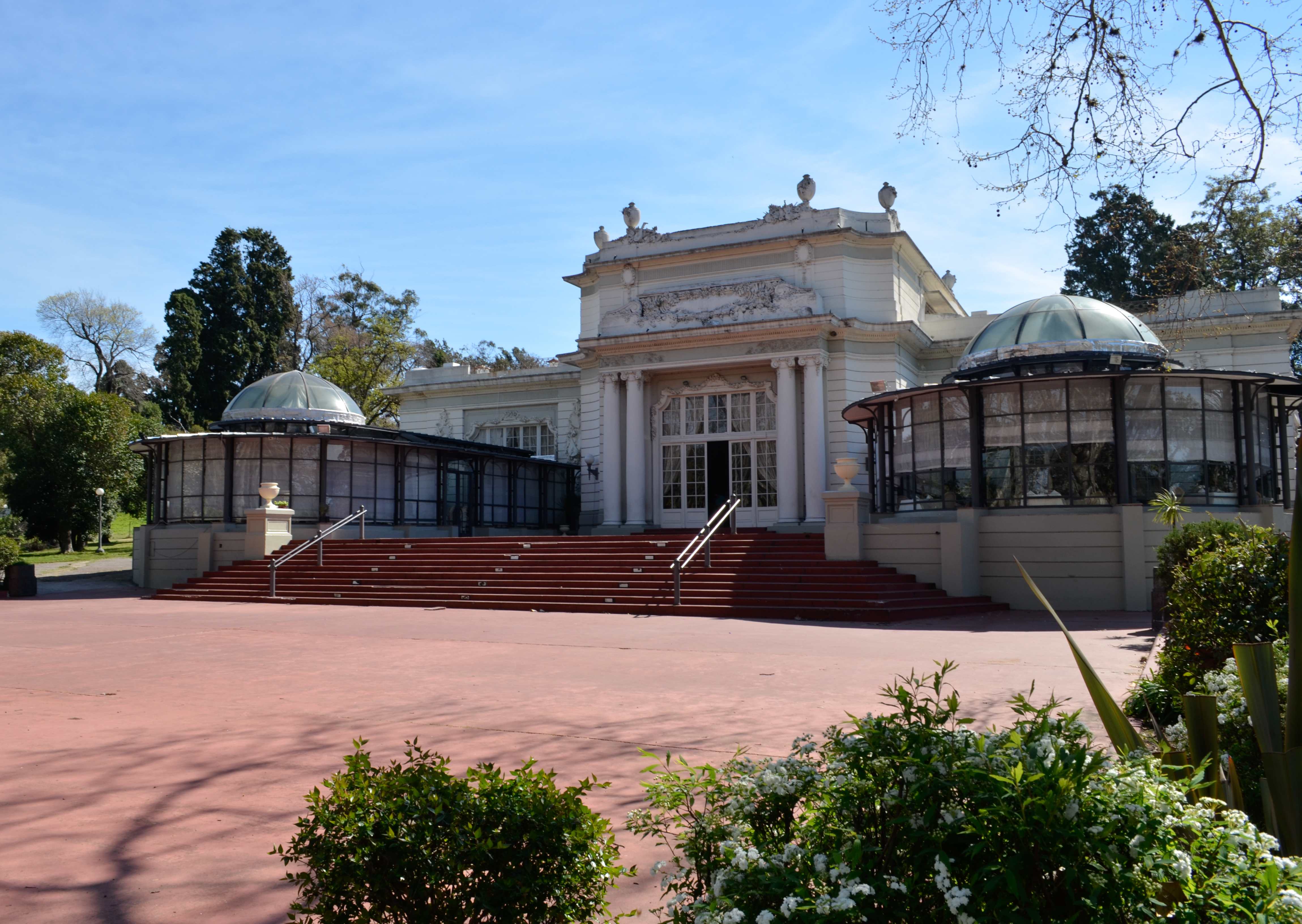 Hotel del Prado. Ubicada en el departamento de Montevideo